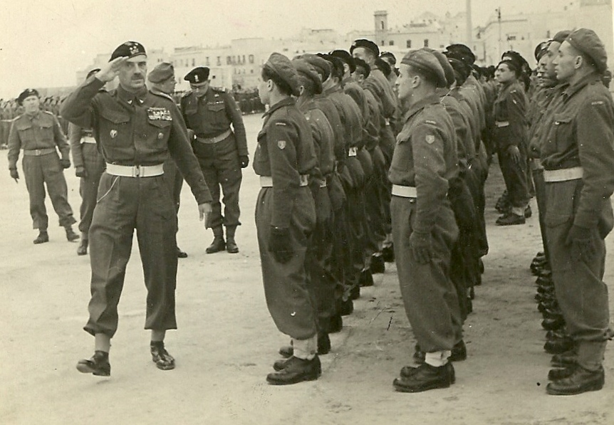 Inspekcja w CWWPanc w Gallipoli. Na pierwszym planie gen. Anders. Stanisław Szostak w glebi w czarnym berecie rozmawia z gen Przewlockim